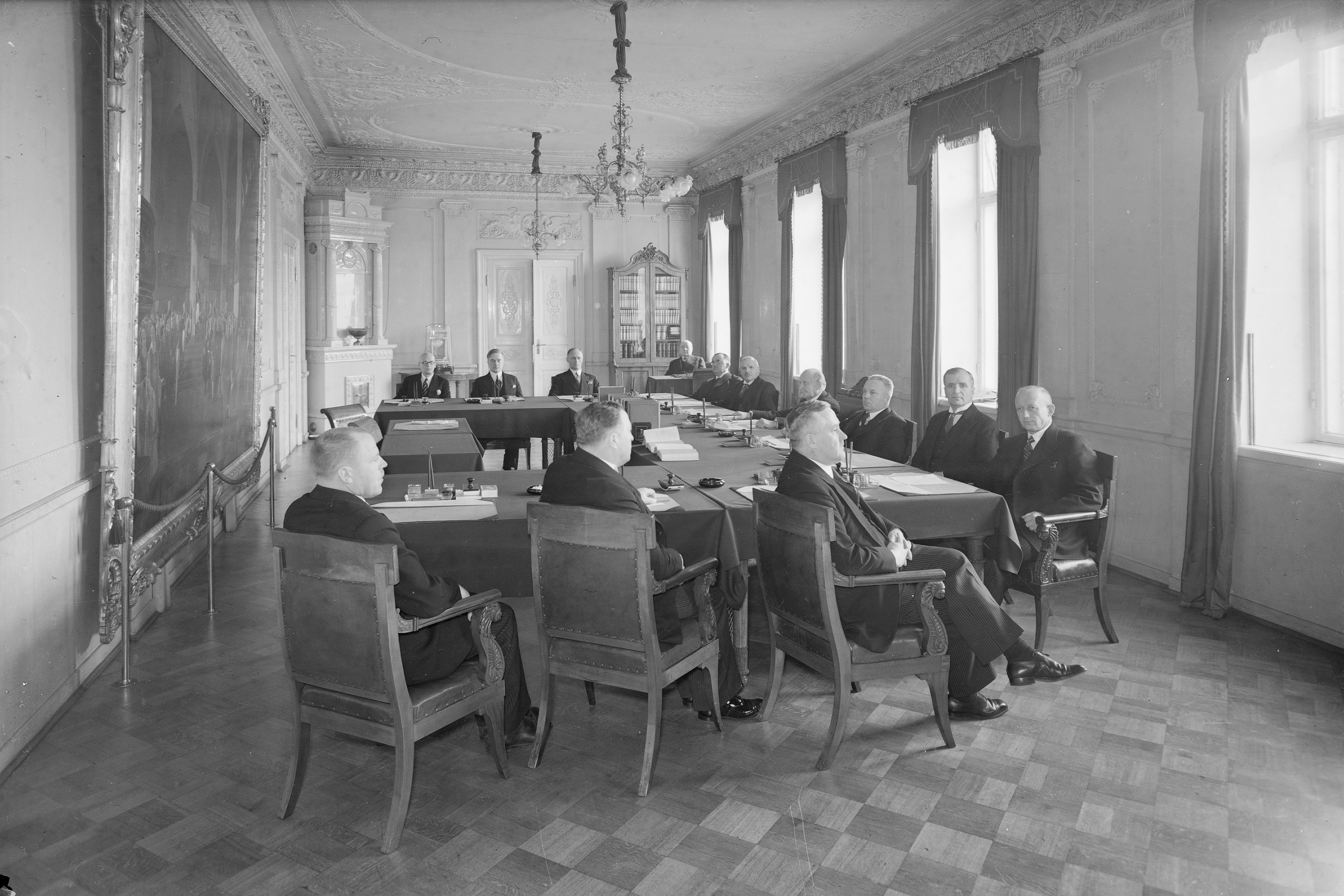 Kyösti Kallion IV hallitus avajaisistunnossaan: vasemmalta kiertäen: 1. Viljami Kalliokoski, 2. Toivo Janhonen, 3. Arvi Oksala, 4. Pekka Heikkinen, 5. Antti Kukkonen, 6. Juho Niukkanen, 7. Kyösti Kallio, 8. Rudolf Holsti, 9. Jalo Lahdensuo, 10. Vihtori Vesterinen, 11. Yrjö Puhakka, 12. Kalle Kauppi, 13. Urho Kekkonen; taustalla oikeuskansleri Oiva Huttunen.